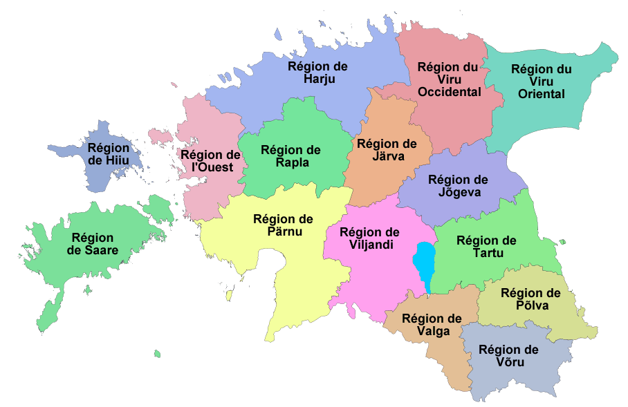 Carte de l'Estonie avec subdivisions par régions.